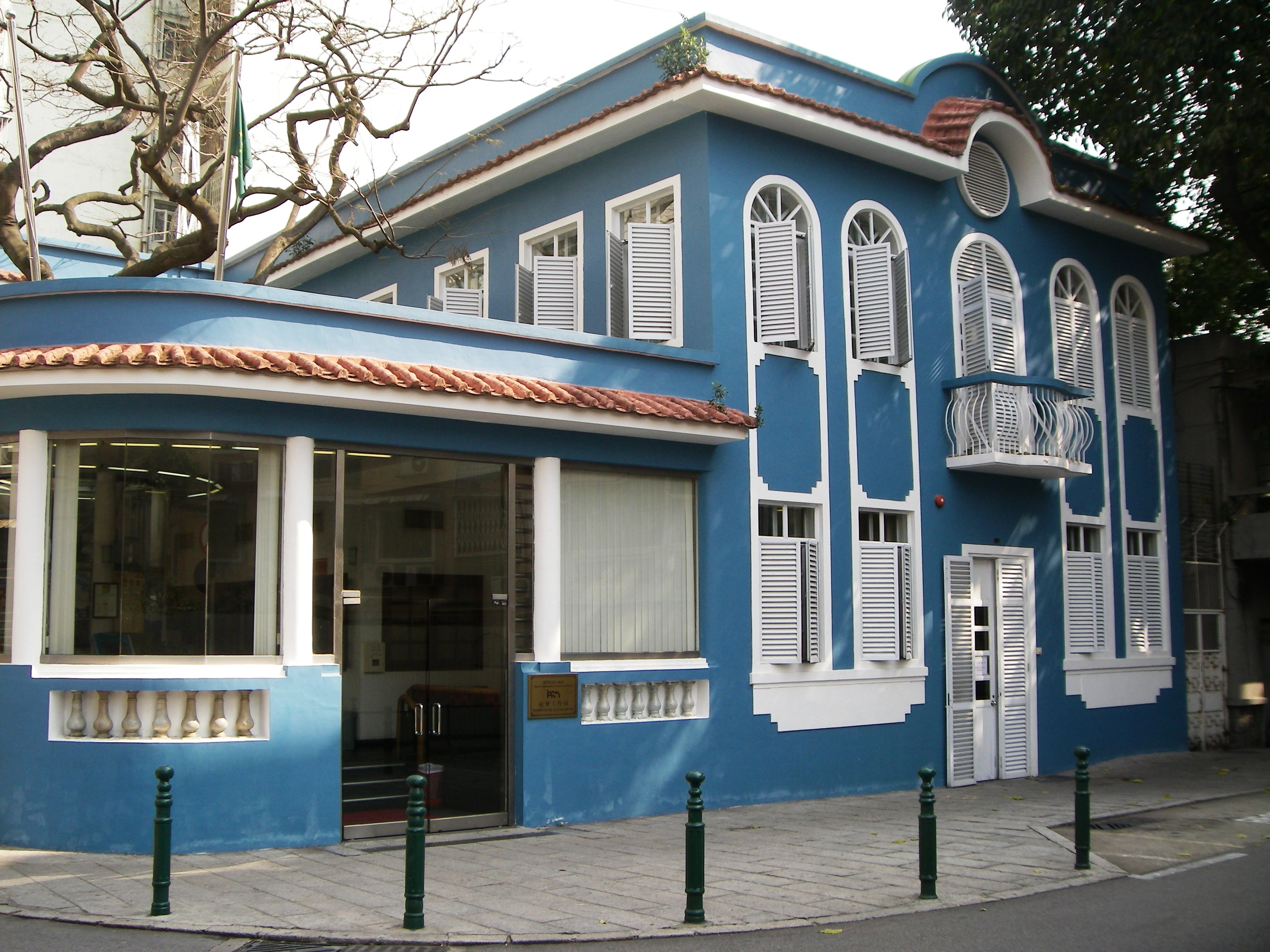 Blue House, Macau